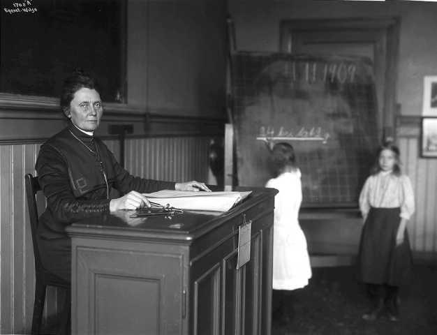 Anna Rogstad (1854–1938) ved kateteret.